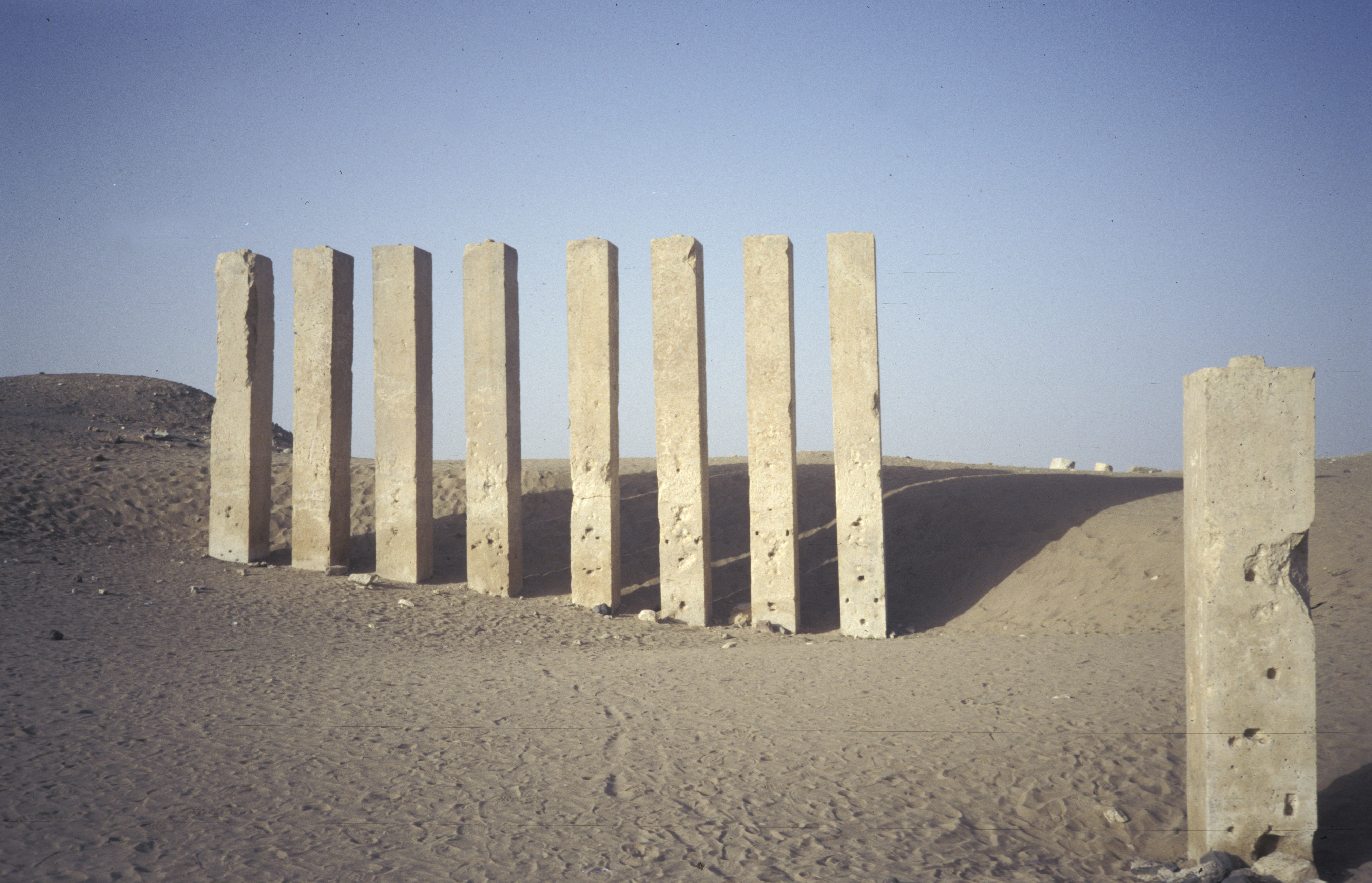 Ancient temple columns - Yemen.